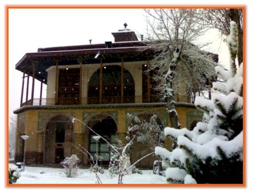 عمارت عالی قاپو قزوین